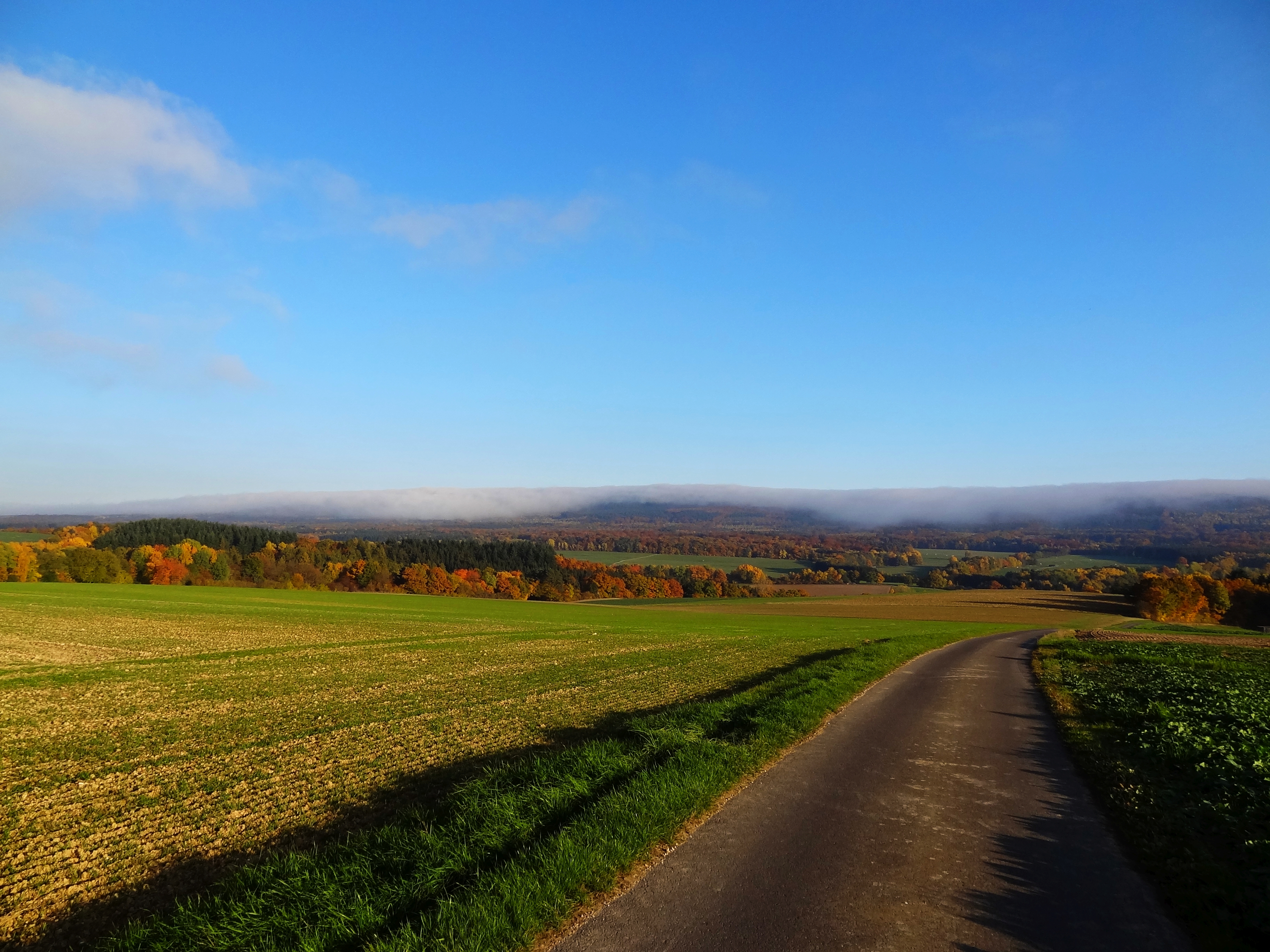 Wie man an dem Bild gut erkennen kann, überströmt feuchte "Nebelluft" den Kamm des Soonwaldes. Beim Absinken erwärmt sich die Luft und der Nebel löst sich auf. Die Föhnmauer ist klar erkennbar.